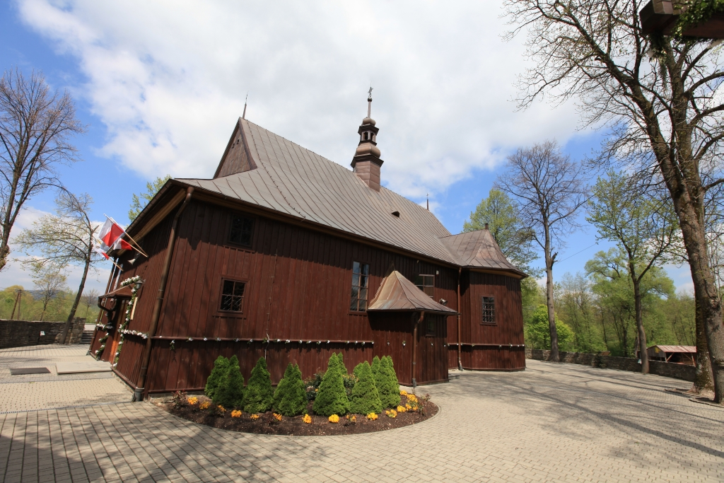 Słopnice - rzymskokatolicki kościół parafialny p.w. św. Andrzeja Apostoła, 1774-1776